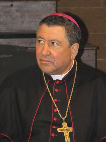 Arcivescovo Emerito di Agrigento